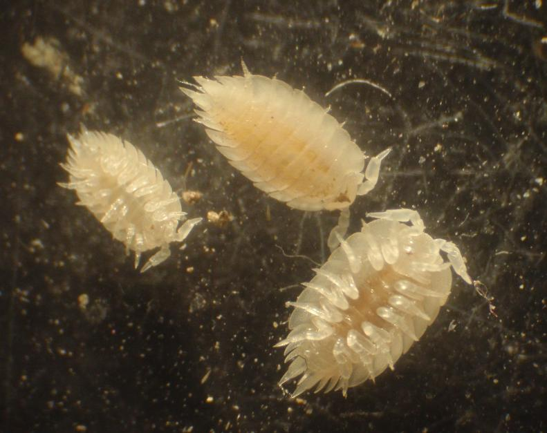 Platyarthrus hoffmannseggii (gruppo)